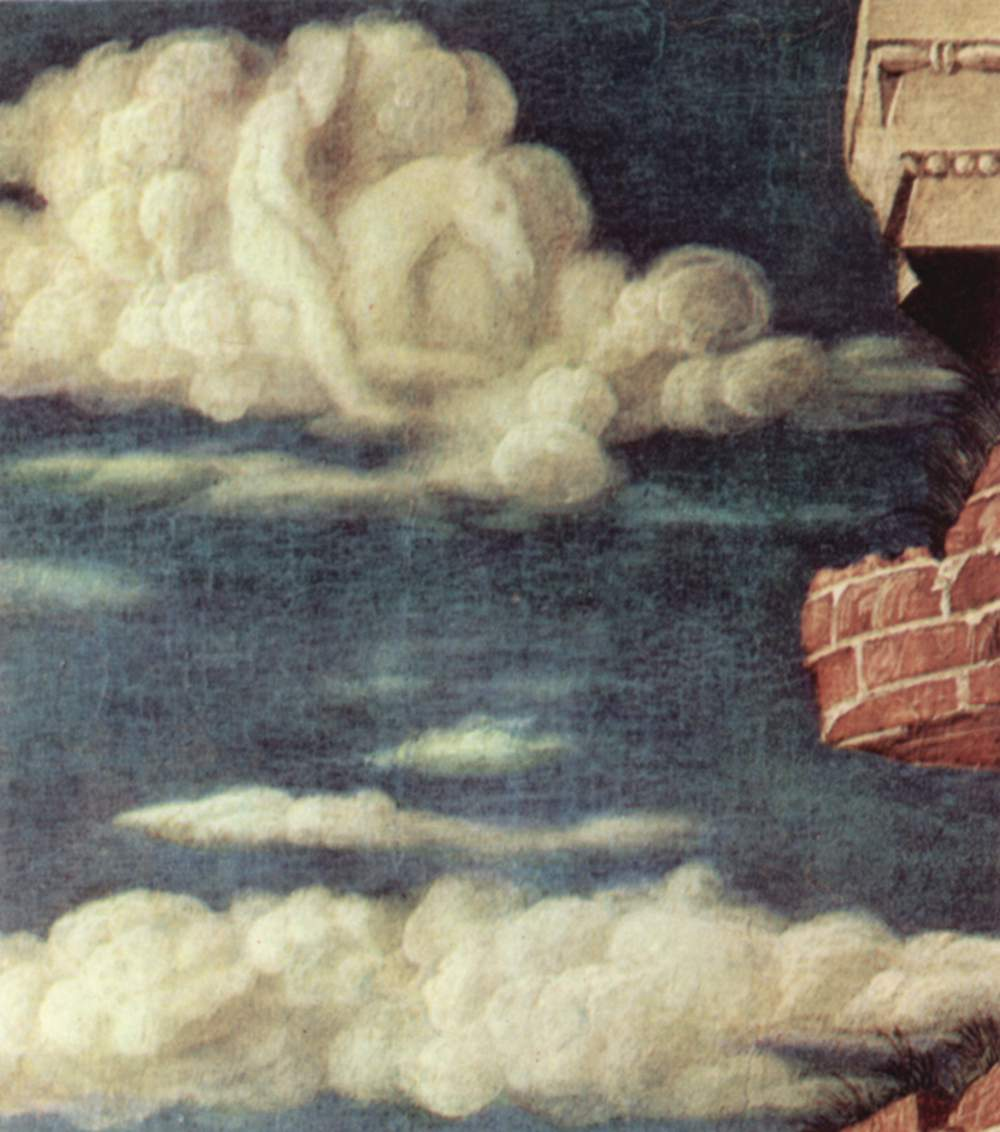 detail: Himmel